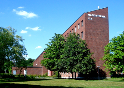 Byggnaden för maskinteknik på Lunds tekniska högskola, arkitekt Klas Anshelm